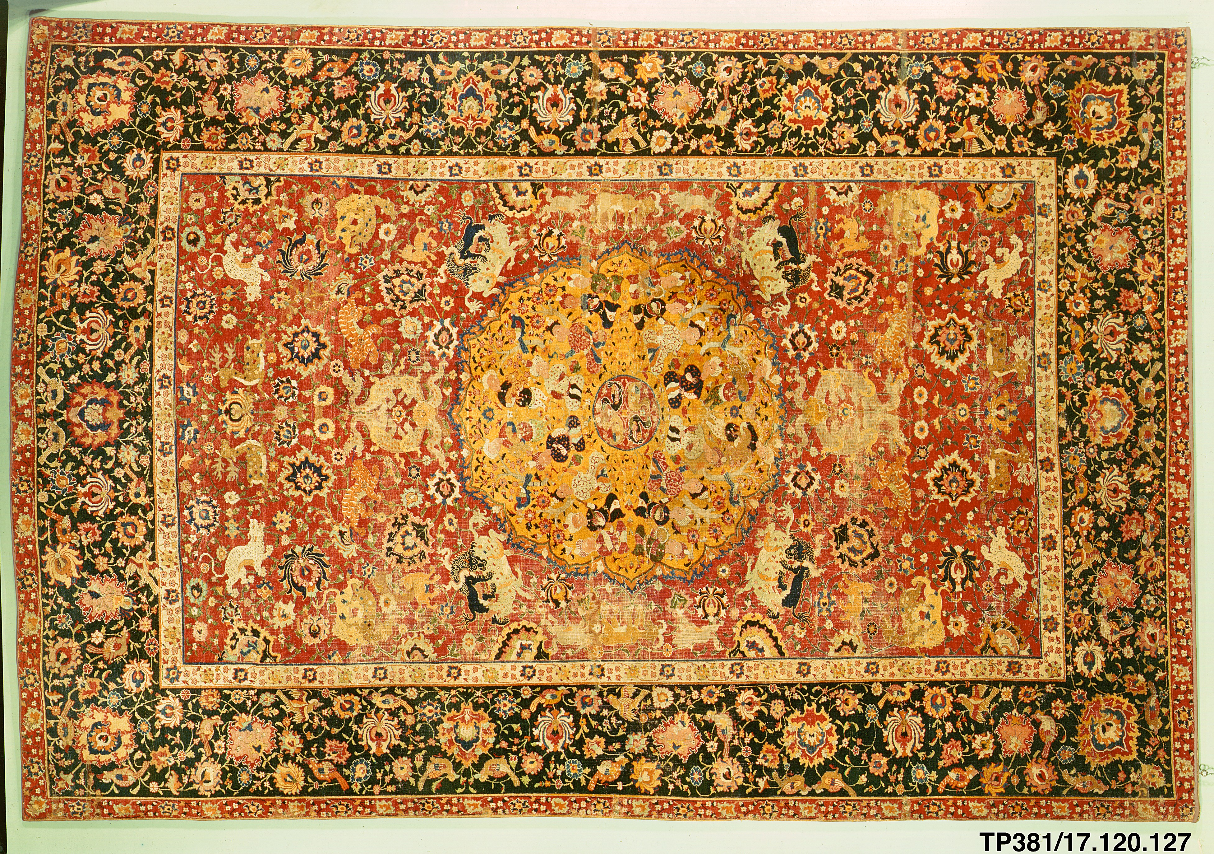 Textiles ;Rugs ; carpets